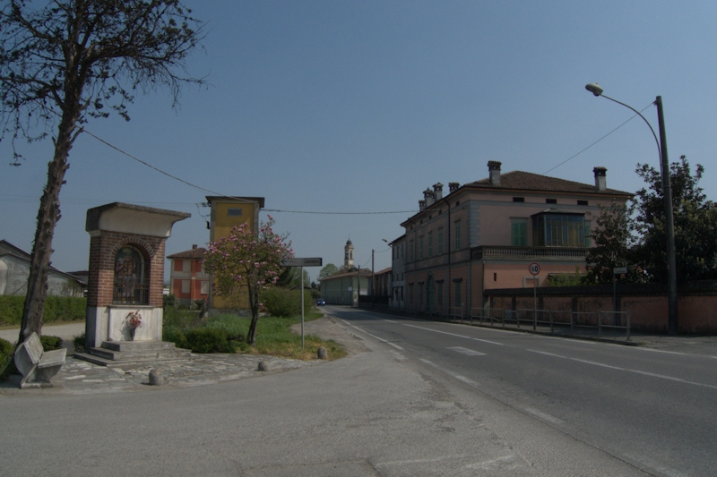 La strada provinciale ex SS235 presso Ticengo